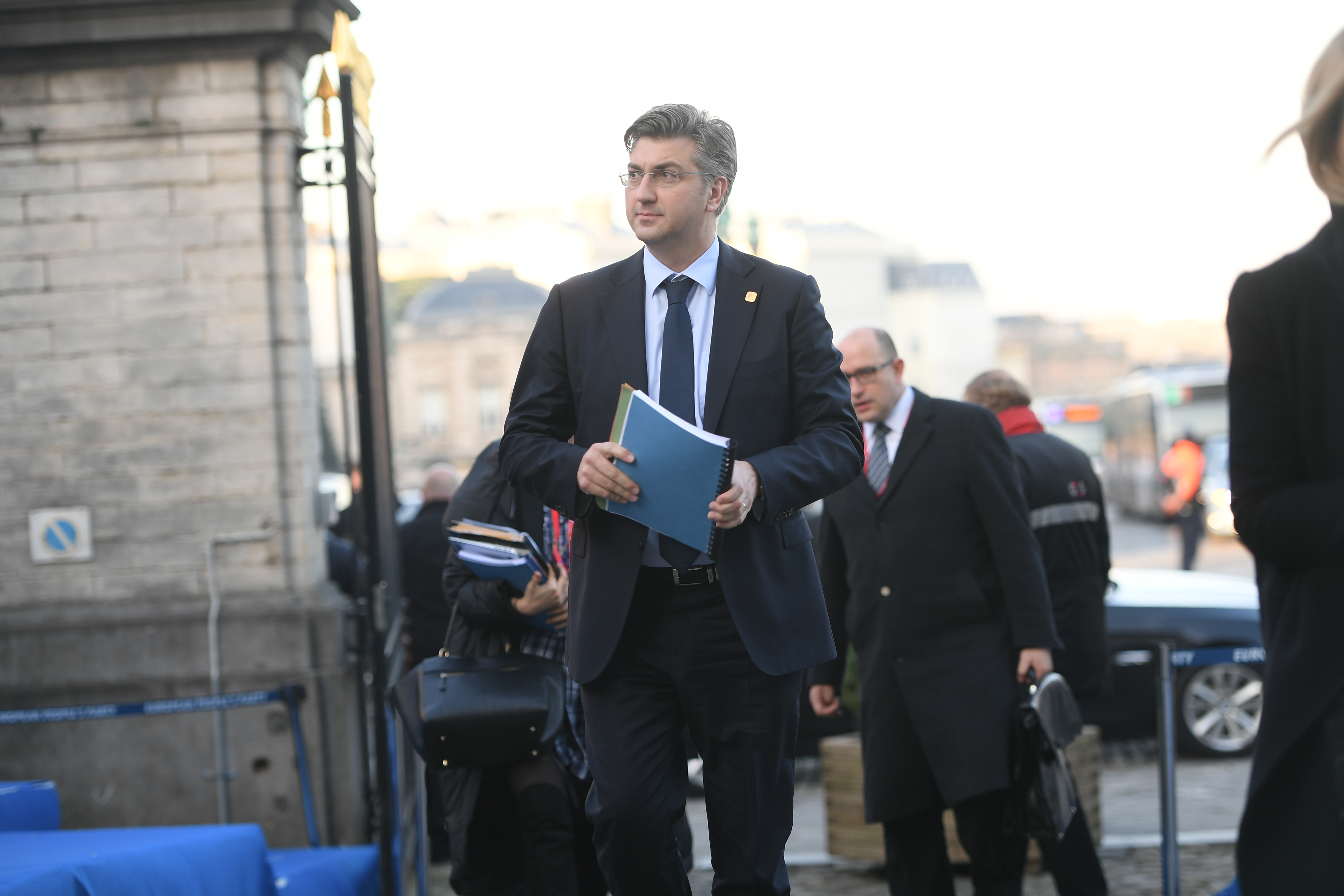 EPP Summit, Brussels, December 2016